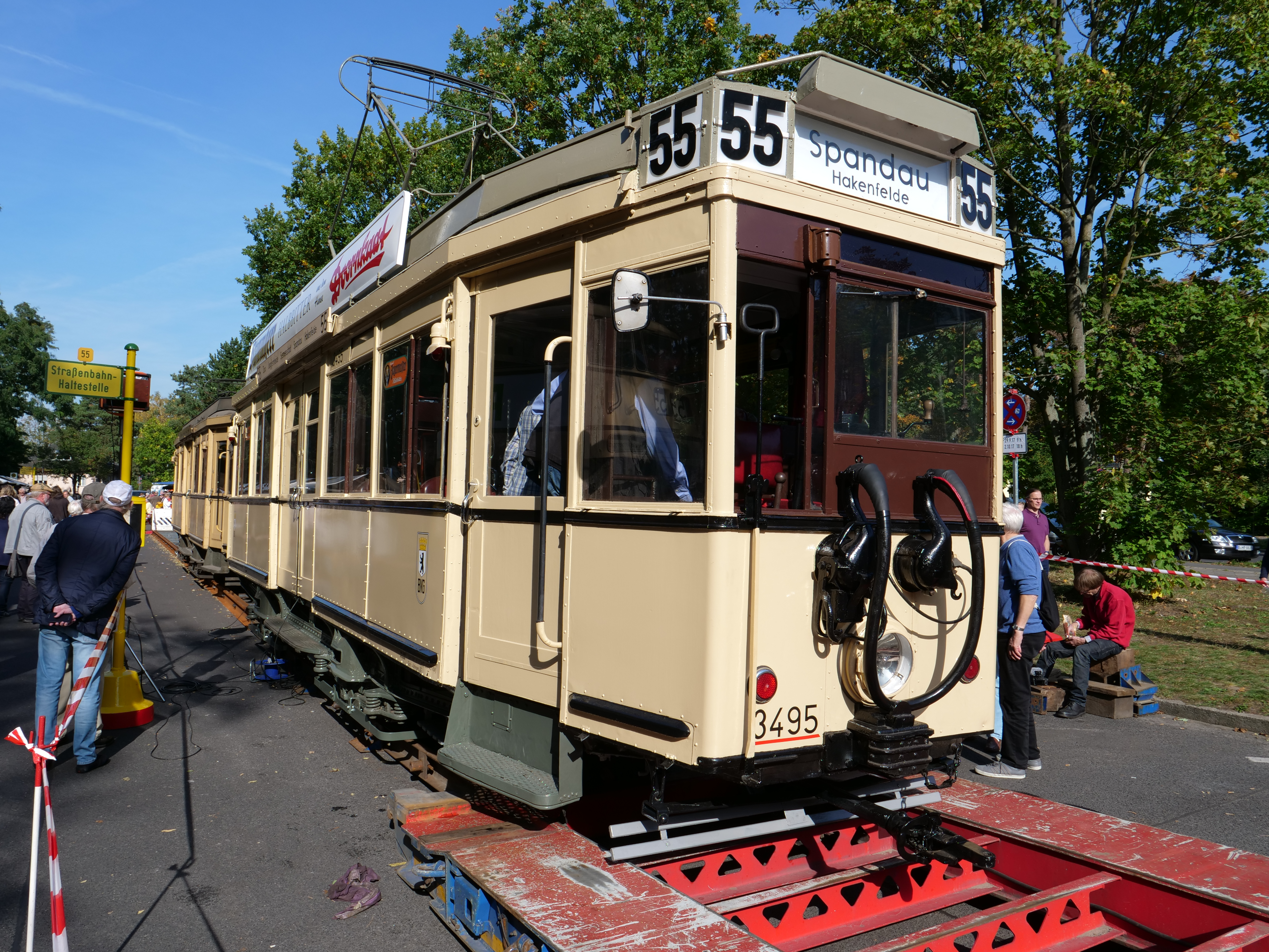 Historische Straßenbahn beim Straßenbahnfest an der ehemaligen Wendeschleife der Straßenbahn in Berlin-Hakenfelde. Triebwagen TM 36 von 1927.